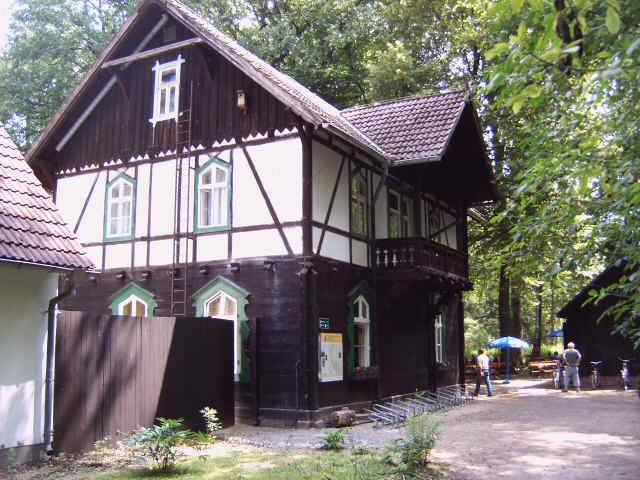 Gaststätte Wotschofska im Spreewald, Land Brandenburg, Deutschland Bild aufgenommen am 29.6.2006 durch Olaf Meister